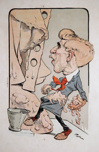 Dibujo original en tinta china acuarelado. Publicado en Revista Caras y Caretas, Año VI, Nº 237, Abril 10, 1903, bajo el título "Caricaturas Contemporáneas". Al dorso, arr, izq: "C. A. 240/57"; al lado "Mateo Alonso [...] autor Cristo de los Andes"; lápiz manuscrito: Ab, izq, sello del MDC..